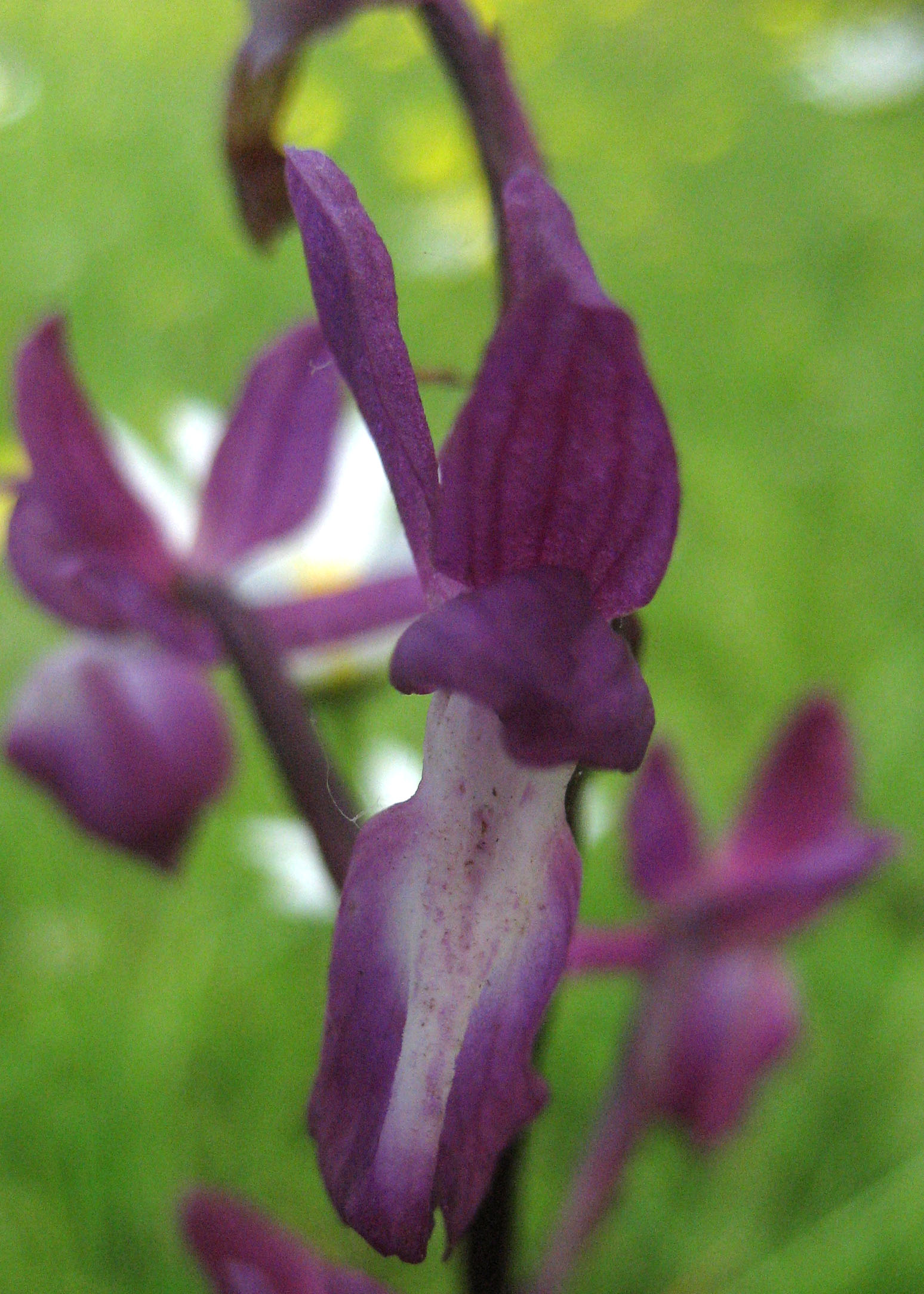 Anacamptis laxiflora , Orchis laxiflora. France, Normandie, near Pirou.